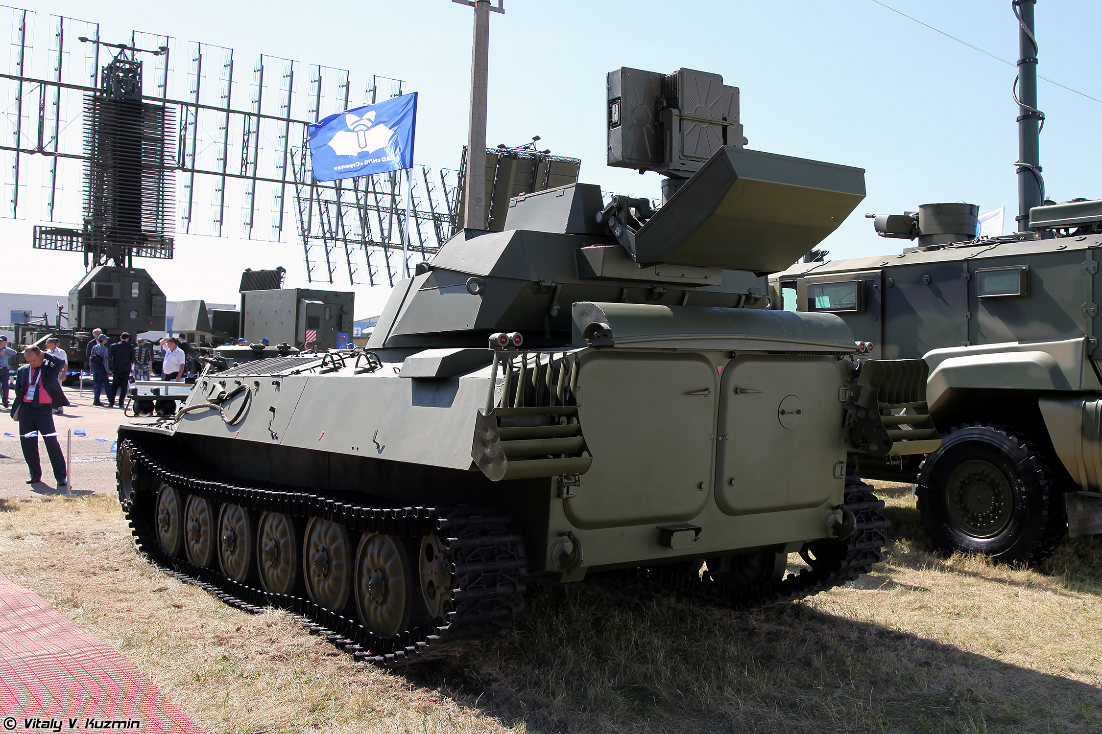 РЛС СНАР-10М1 (SNAR-10M1 radar)